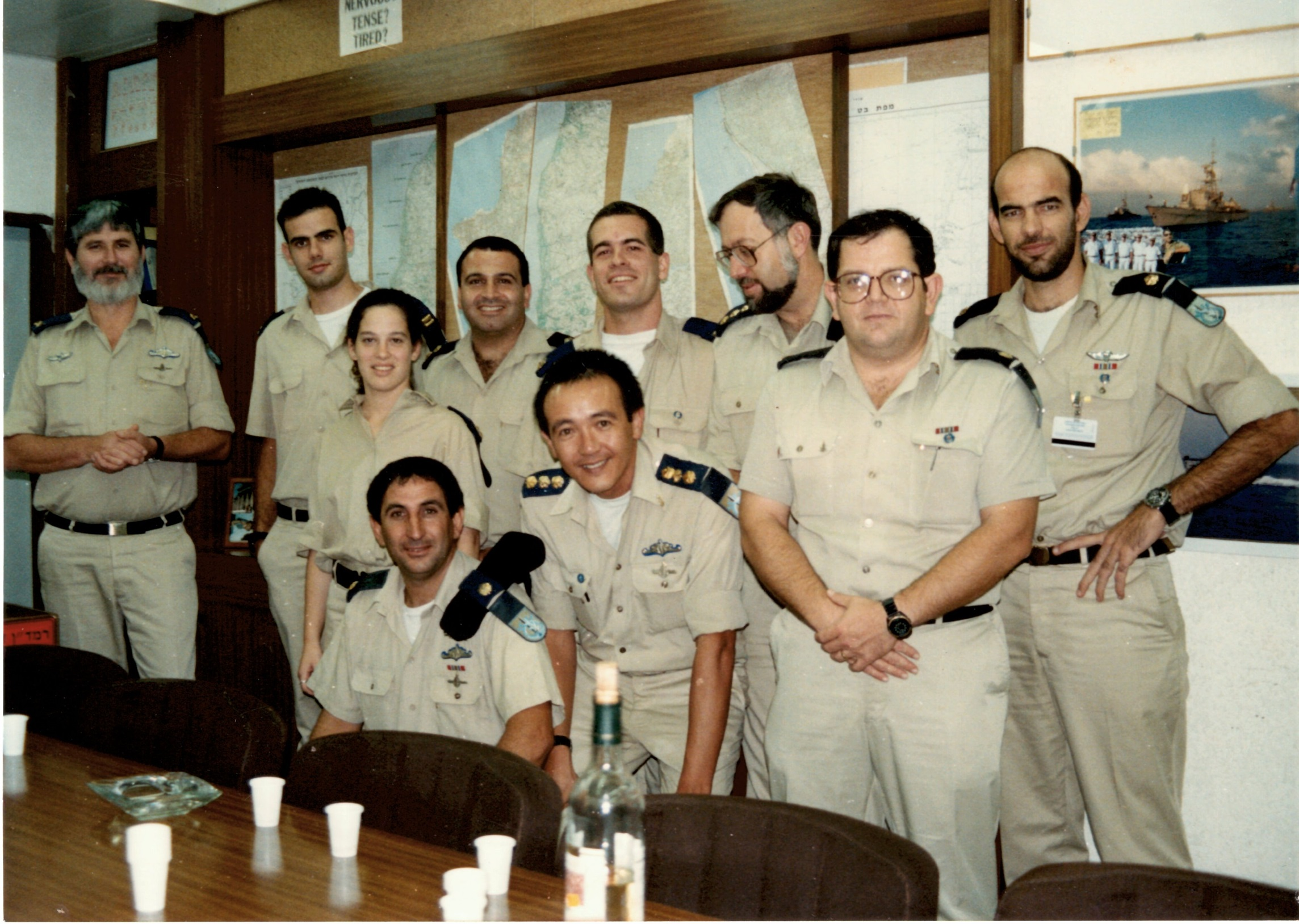 רוני אכר עם סגל הבכיר במספן המודיעין.